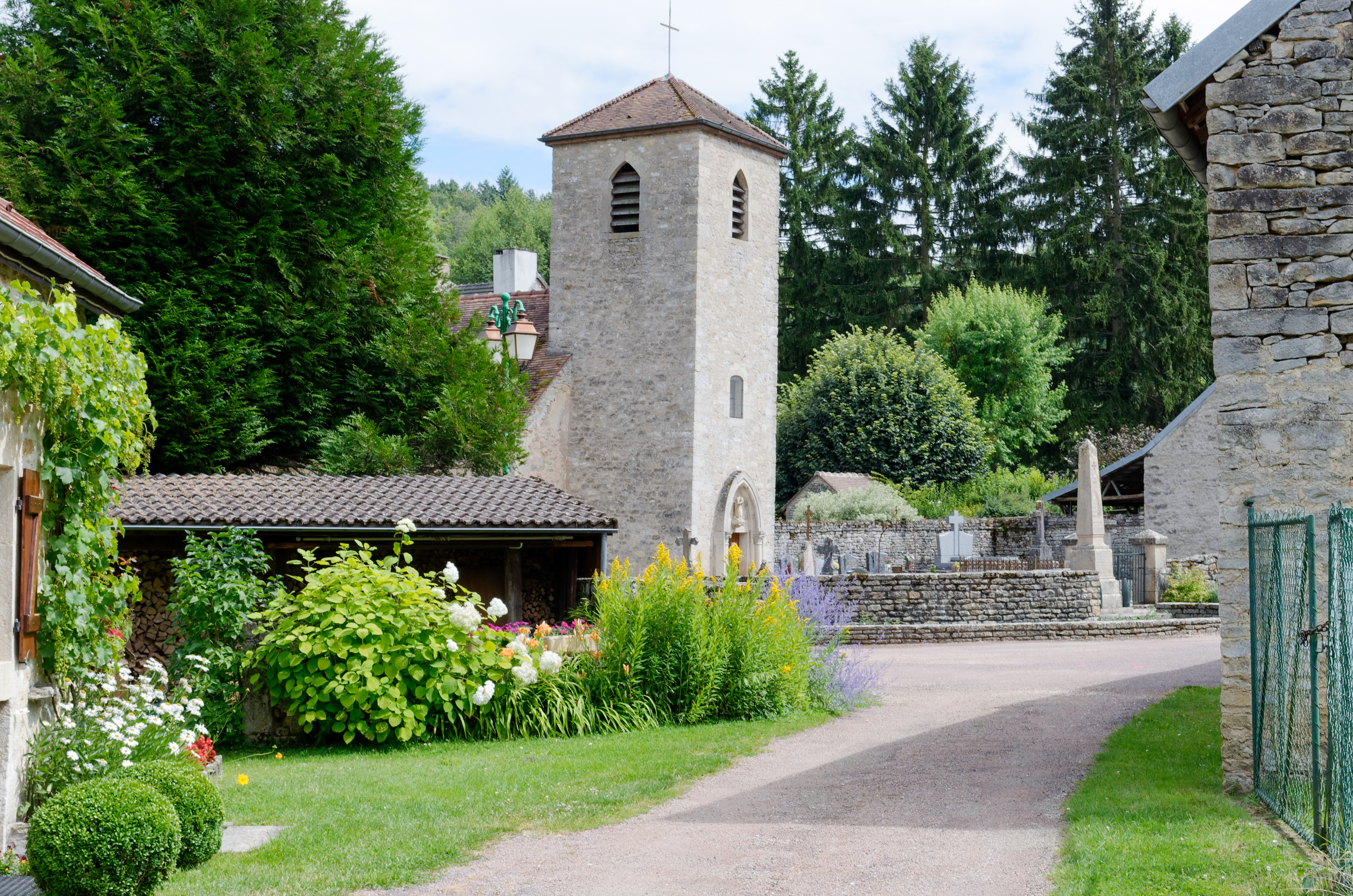 Vue de Drée